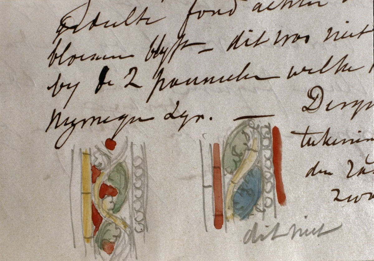 Glas-in-lood/ Kerken: Interieur, brief van P, Cuypers met aanwijzingen aan F. Nicolas, collectie C.B. Nicolas, Krimpen aan den IJssel (opmerking: Gefotografeerd voor Glas in lood in Nederland 1817-1968)